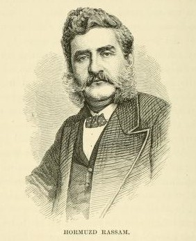 Hormuzd Rassam (1826-1910) war Assistent von Austen Henry Layard und machte Ende 1852 eigene Ausgrabungen unter Aufsicht von Sir Henry Rawlinson in Assyrien und später in Babylonien. Er war mit Newman bekannt.